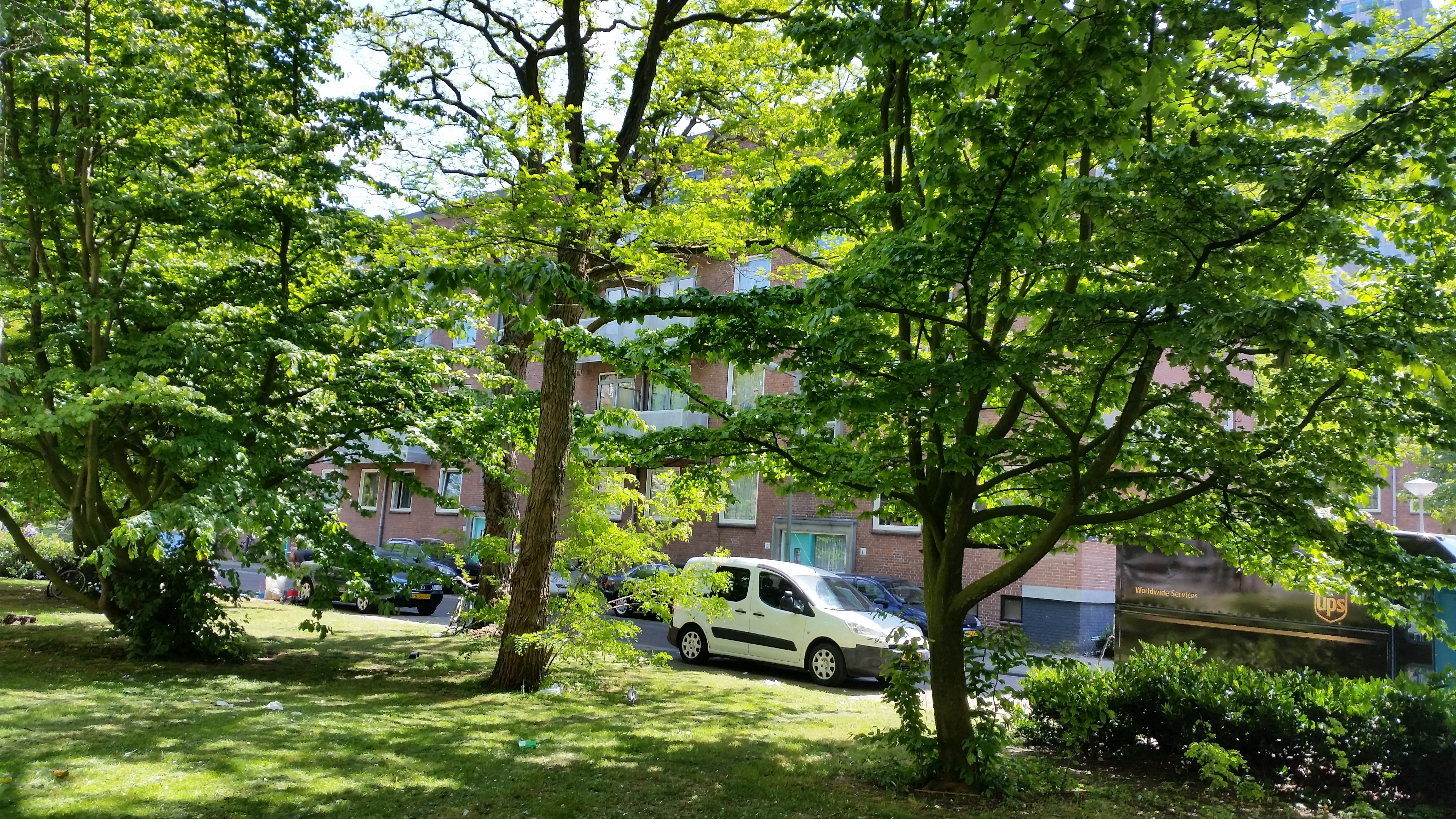 Impressie van de Goudriaanstraat, Amsterdam-Oost